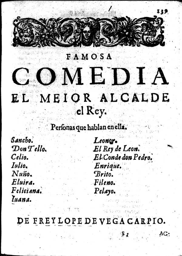 Íncipit de El mejor alcalde, el rey de Lope de Vega en Veinte y una parte verdadera de las Comedias del Fenix de España Frei Lope Felix de Vega Carpio..., Madrid, Viuda de Alonso Martín, 1635, fols. 139-157v. Imagen: fol. 139r. Localización: Biblioteca Nacional (España). Sig. R-13872.